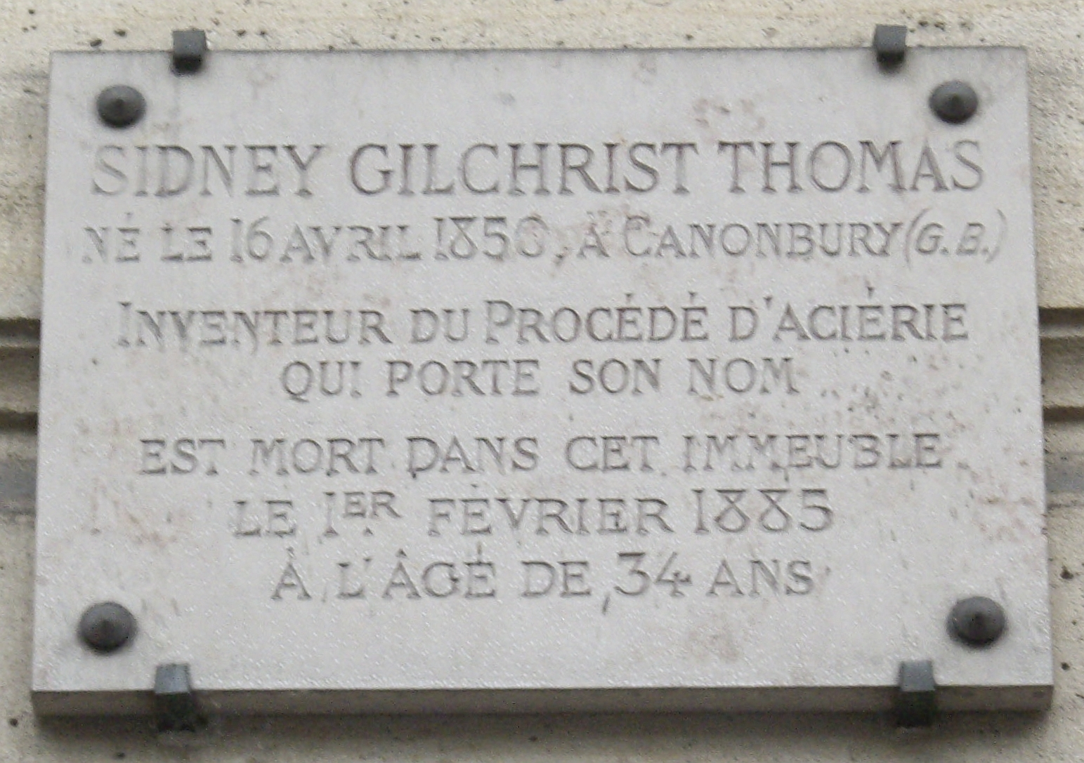 Plaque commémorative, 61 avenue Marceau, Paris 16e.« Sidney Gilchrist Thomas, né le 16 avril 1850 à Canonbury (G.-B.), inventeur du procédé d'aciérie qui porte son nom, est mort dans cet immeuble le 1er février 1885 à l'âge de 34 ans. »